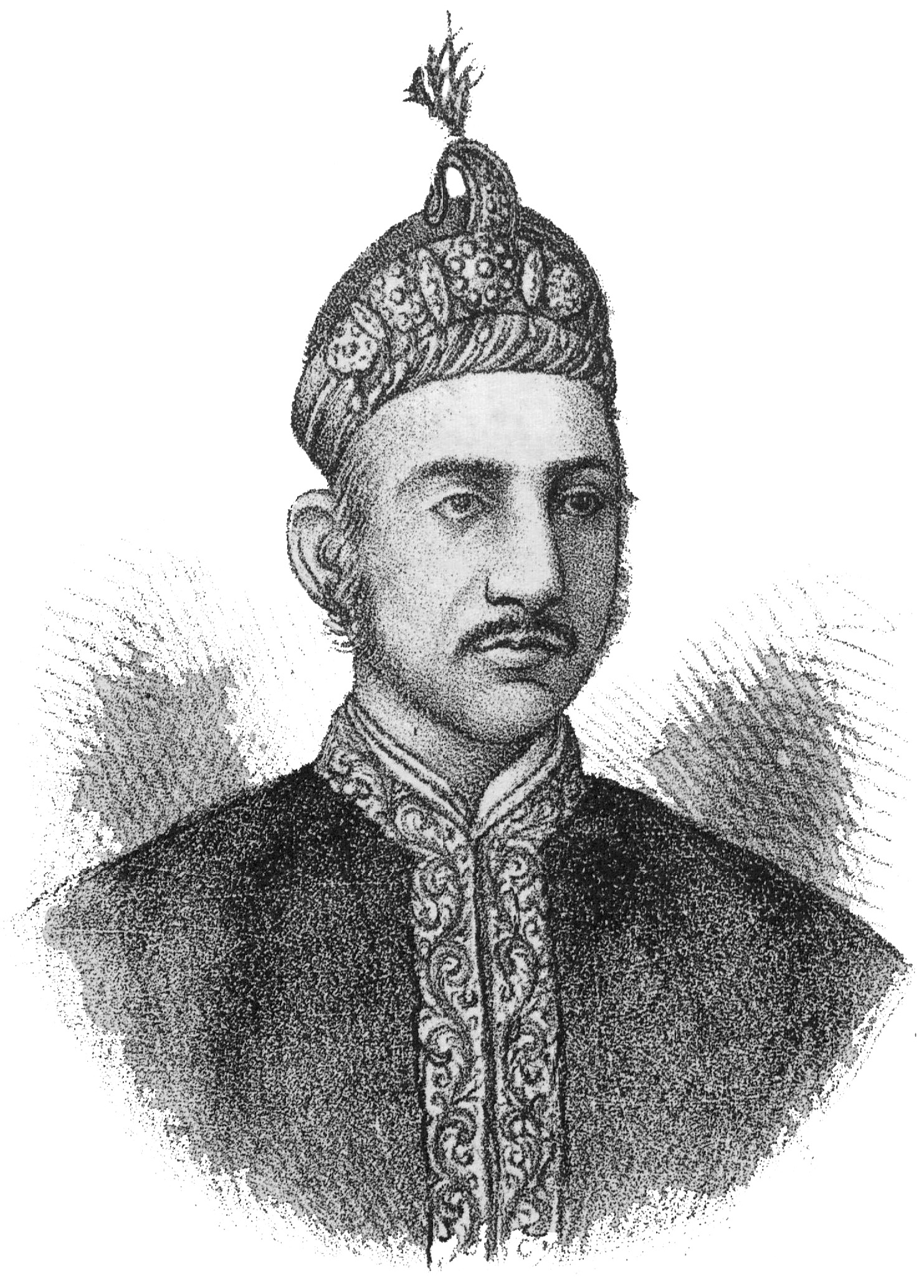 نظام‌الملک میرمحبوبعلیخان